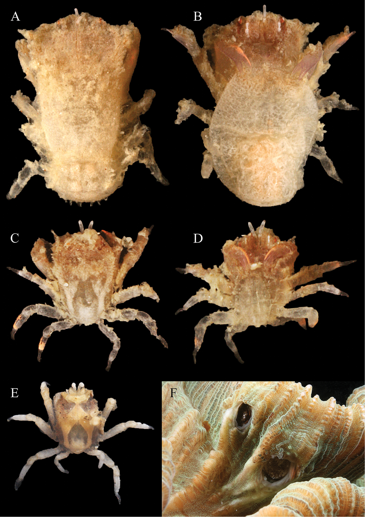 Lithoscaptus semperi. A: vista dorsal de hembra, B: vista ventral de hembra, C: vista dorsal de macho, D: vista ventral de macho, E: vista dorsal de macho juvenil, F: alojamiento de L. semperi, izquierda macho y derecha hembra, en Trachyphyllia geoffroyi, Kudat, Malasia.